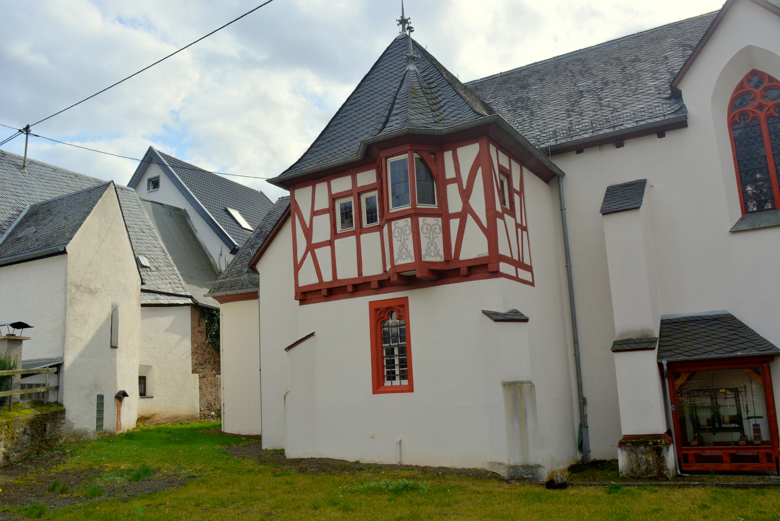 Sint-Servatiuskerk, sacristie